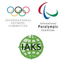 Partner Logos des IOC/IAKS Awards und der IPC/IAKS Auszeichnung